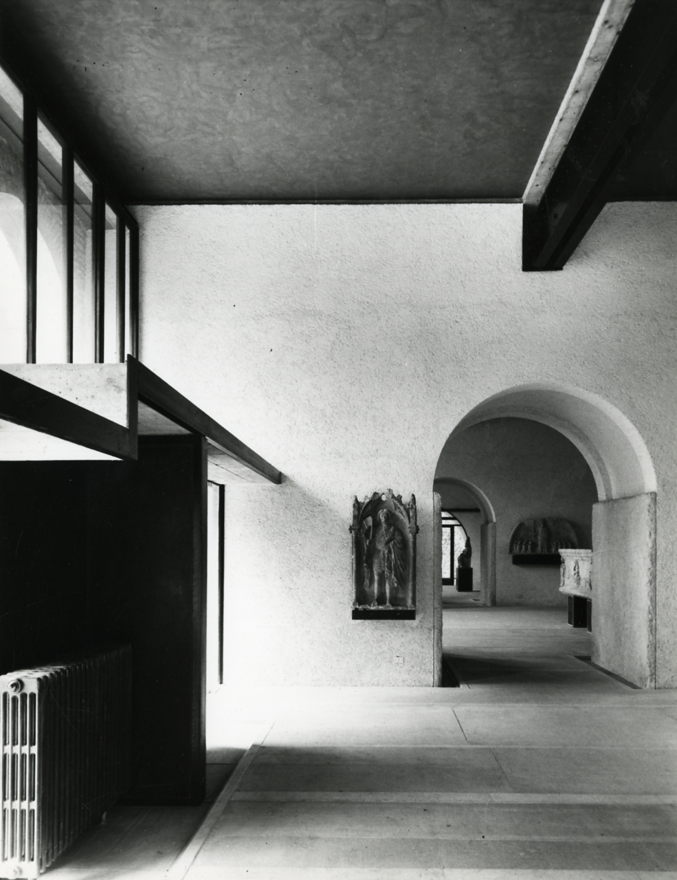 Servizio fotografico : Venezia, 1964 / Paolo Monti. - Stampe: 3 : Positivo b/n, gelatina bromuro d'argento/ carta, 24x30. - ((Al verso delle stampe manoscritti i numeri dei negativi corrispondenti: 10295, 10296, 10297. - Sul coperchio della scatola iscrizione didascalica manoscritta a pennarello nero: "Verona". - Occasione: Documentazione del restauro e dell'allestimento ad opera dell'architetto Carlo Scarpa. - Fonte: Agenda di Paolo Monti: Monti/ 2/ 6 giugno 1964 - 31 marzo 1966/ 8194-12420 (1964-1966), presso Archivio Paolo Monti